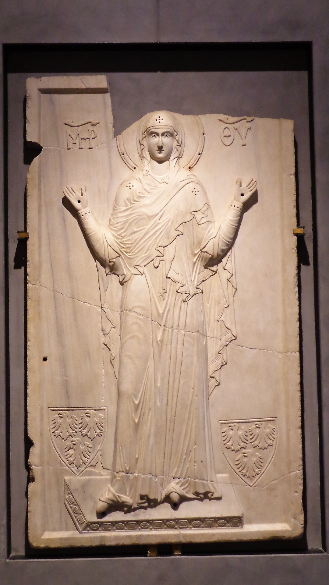 Bassorilievo